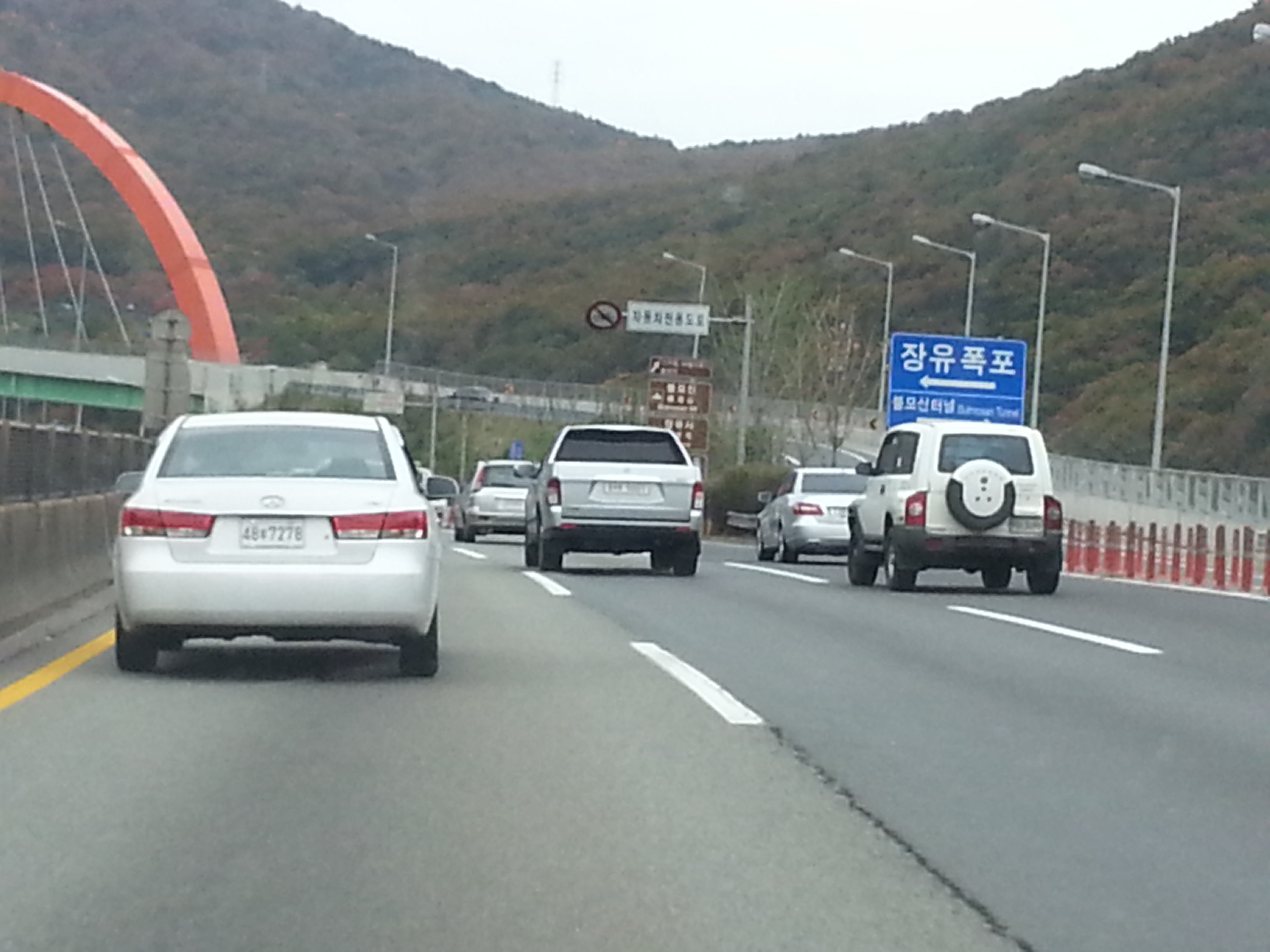 대한민국 창원대로를 부산쪽에서 창원쪽으로 갈 때, 창원터널과 불모산터널이 갈리는 곳.